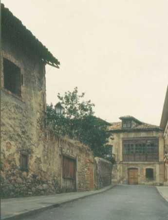 Calle de Ramón Pérez de Ayala en el concejo de Noreña. La casa de Ramón Pérez de Ayala se observa en el fondo de la fotografía.